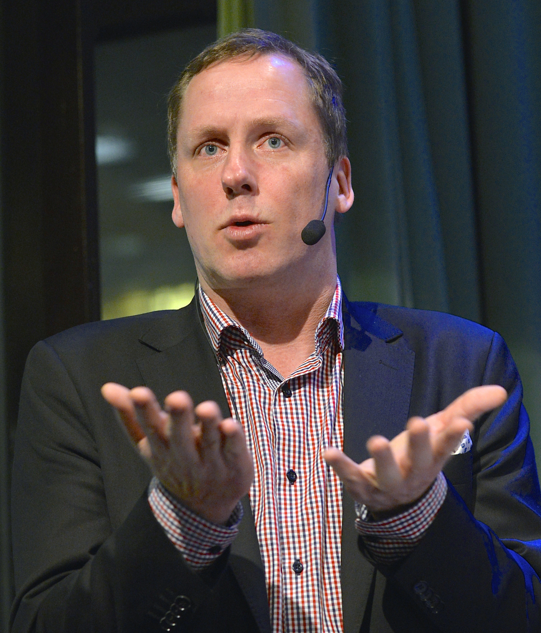 Fredrik Segerfeldt i en debatt om flyktingmottagande och migrationspolitik på Kulturhuset Stadsteatern den 10 december 2014.